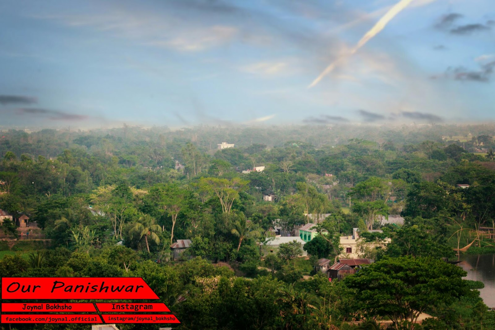 পানিশ্বর ইউনিয়নের সুন্দর একটি ছবি